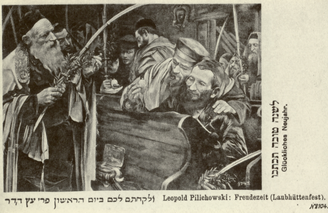 Glückwunschpostkarte mit Darstellung des Laubhüttenfestes, um 1900